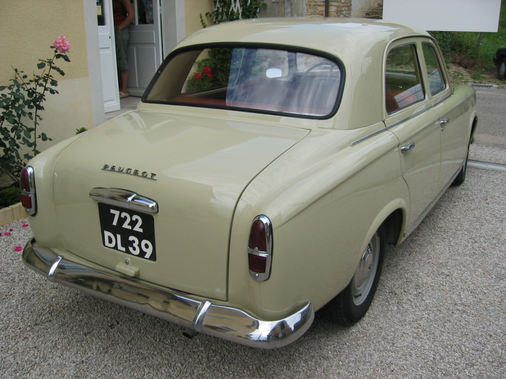 Peugeot 403 de JC et MC Grappe.